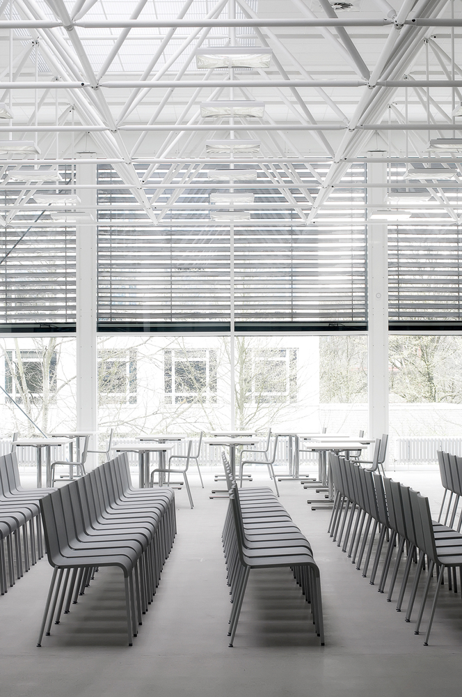 Obergeschoss der BlueBox: Klaus-Steilmann-Auditorium mit Mero-Tragwerk